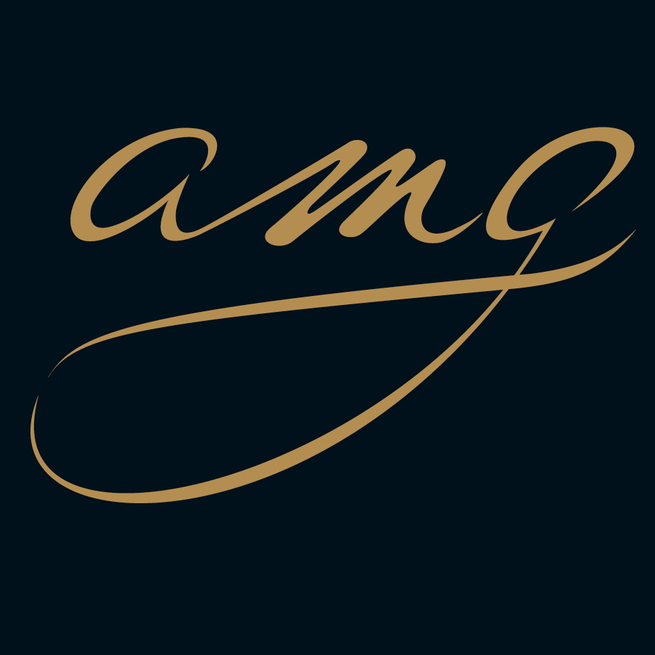 Logo der AMG